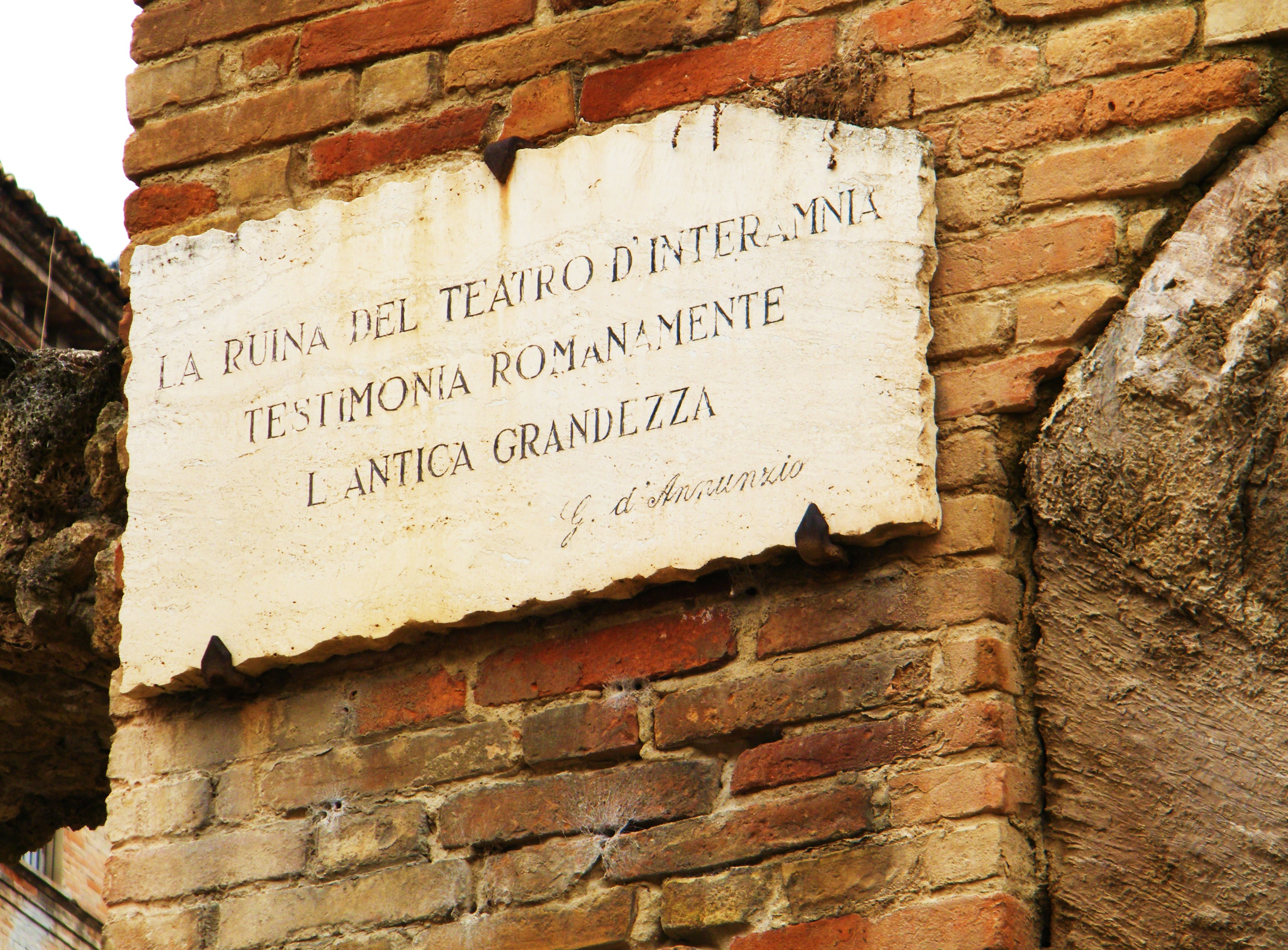 Durante una sua visita a Teramo, Gabriele D'Annunzio manifestò con queste parole il proprio apprezzamento per il monumento teramano.